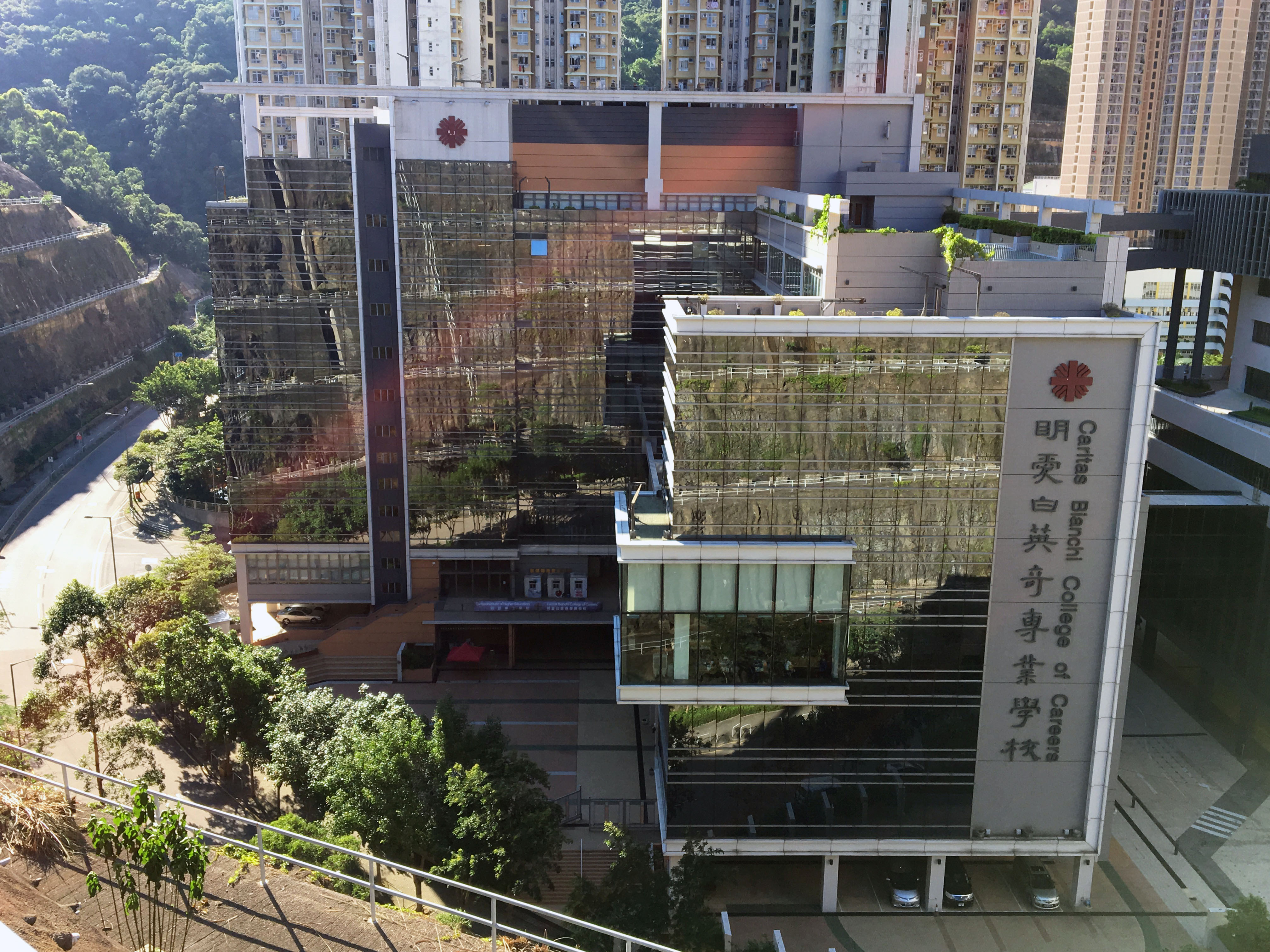 明愛白英奇專業學校調景嶺校舍